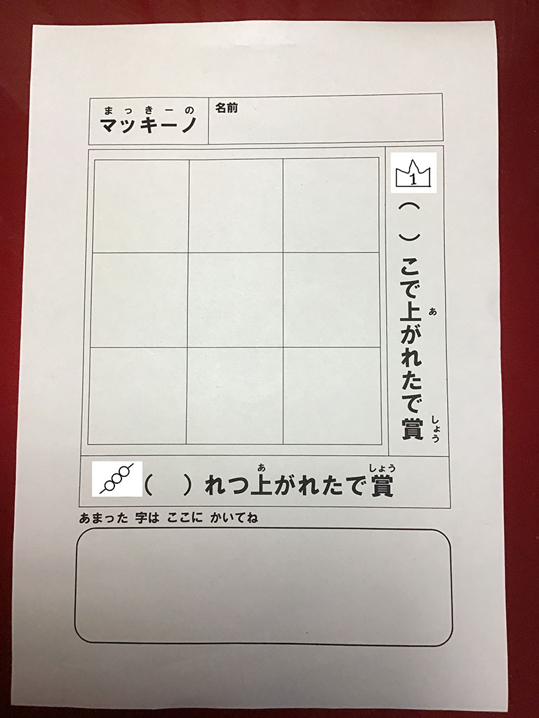 漢字マッキーノ用の9ますの記入用紙